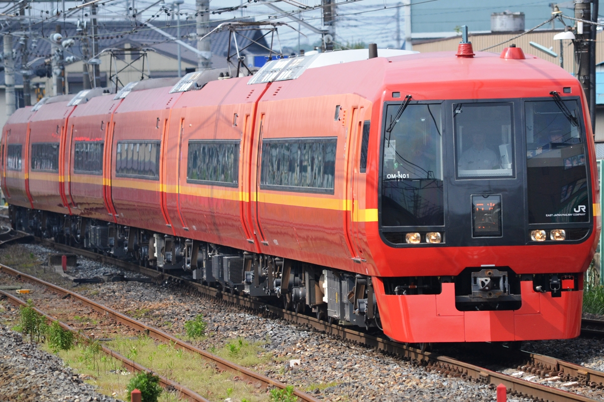 特急日光1号東武日光行き。JR宇都宮線・新白岡駅 - 久喜駅間にて撮影。